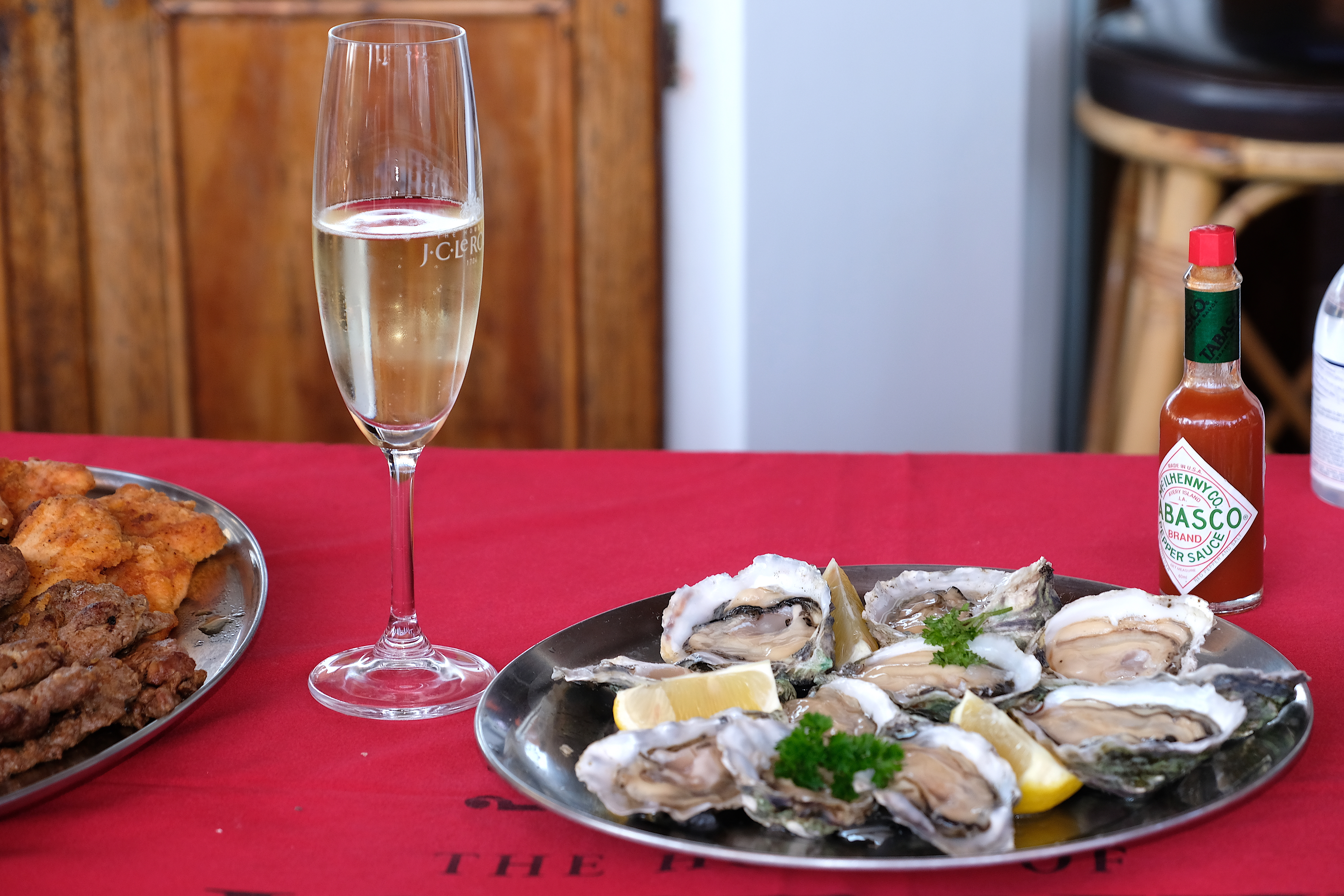 Austern als Delikatesse